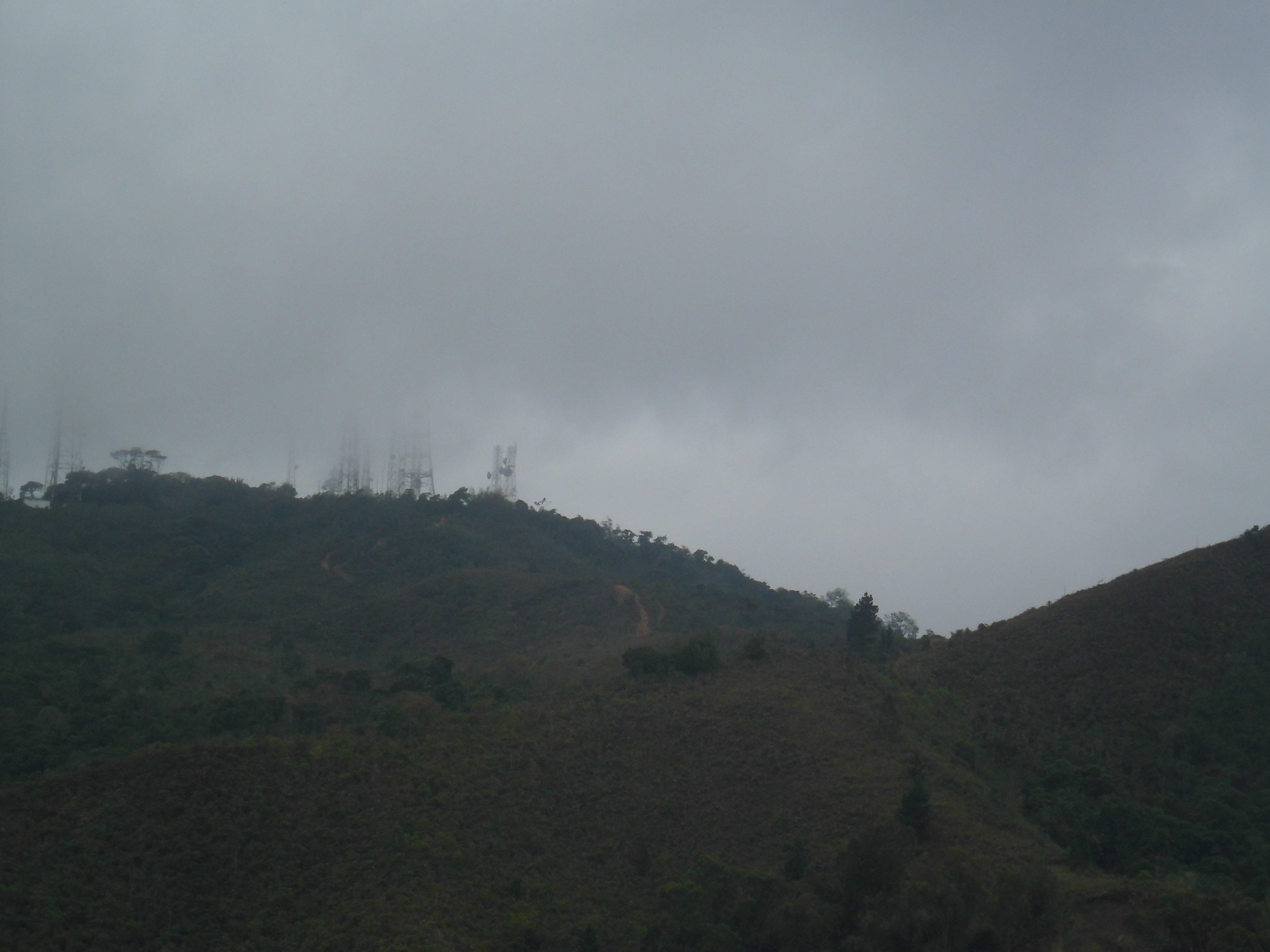 Cerro El Volcán en día lluvioso, municipio El Hatillo estado Miranda Venezuela